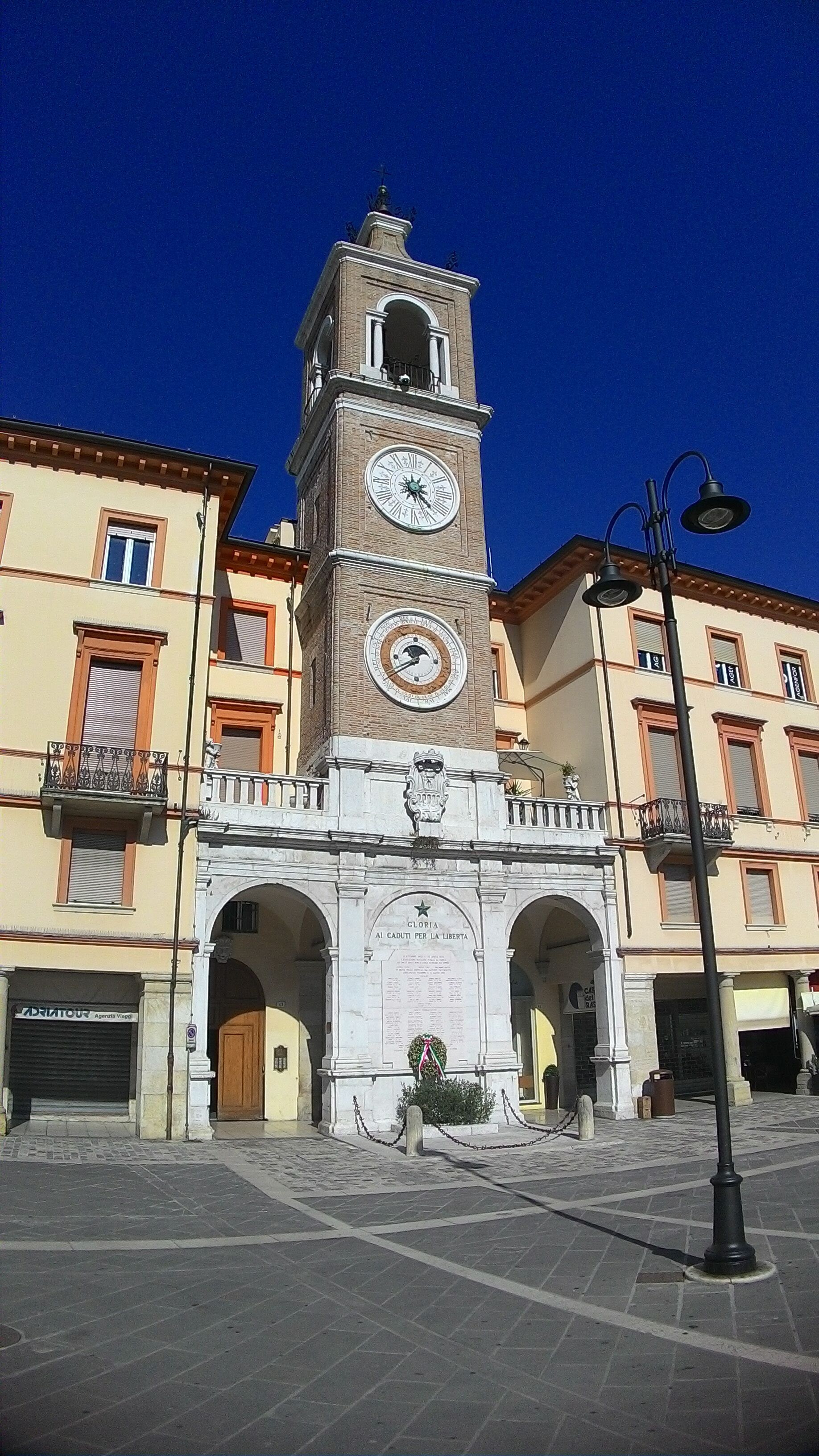 Torre dell'orologio di Rimini This is a photo of a monument which is part of cultural heritage of Italy.